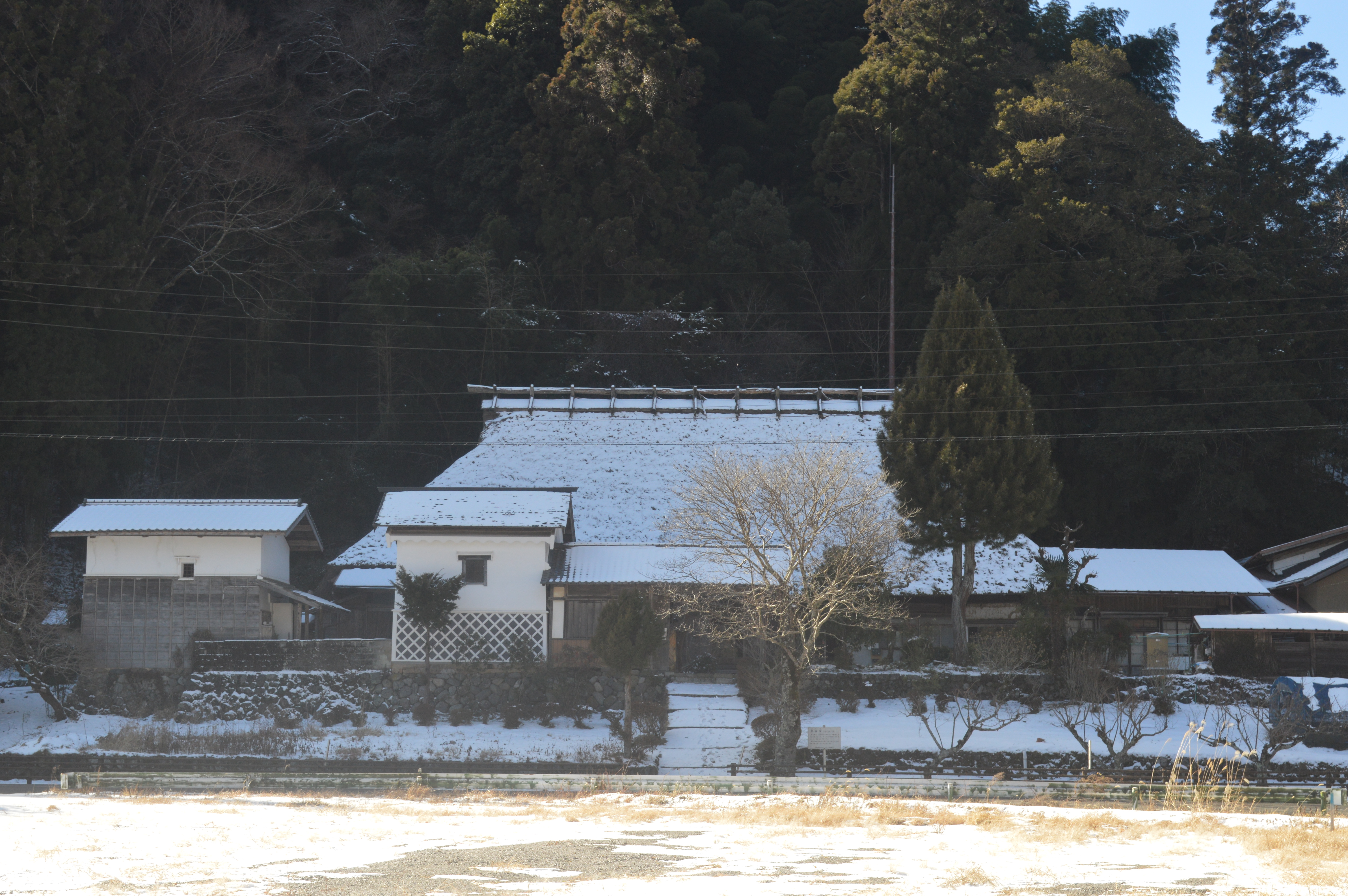 愛知県北設楽郡豊根村の熊谷家住宅。国の重要文化財。